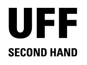 UFF ry:n logo vuonna 2010.